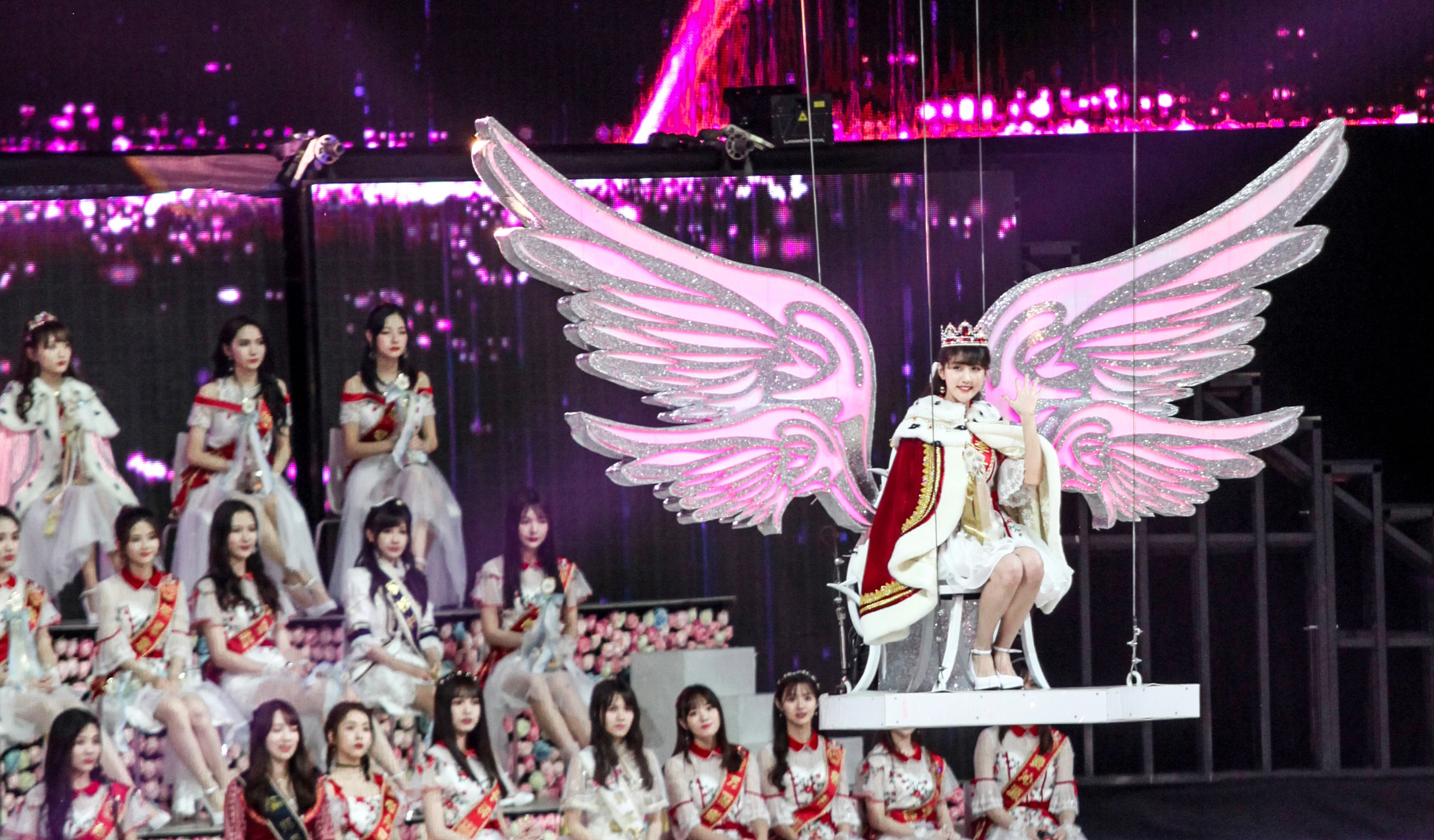 180728总选尾声卡黄实图Part 1 「夜明珠要照了光才会亮」 〔这世界的一切都太过虚假 可眼神这个东西啊 是不会骗人的〕 ps单反的背景虚化我恨!